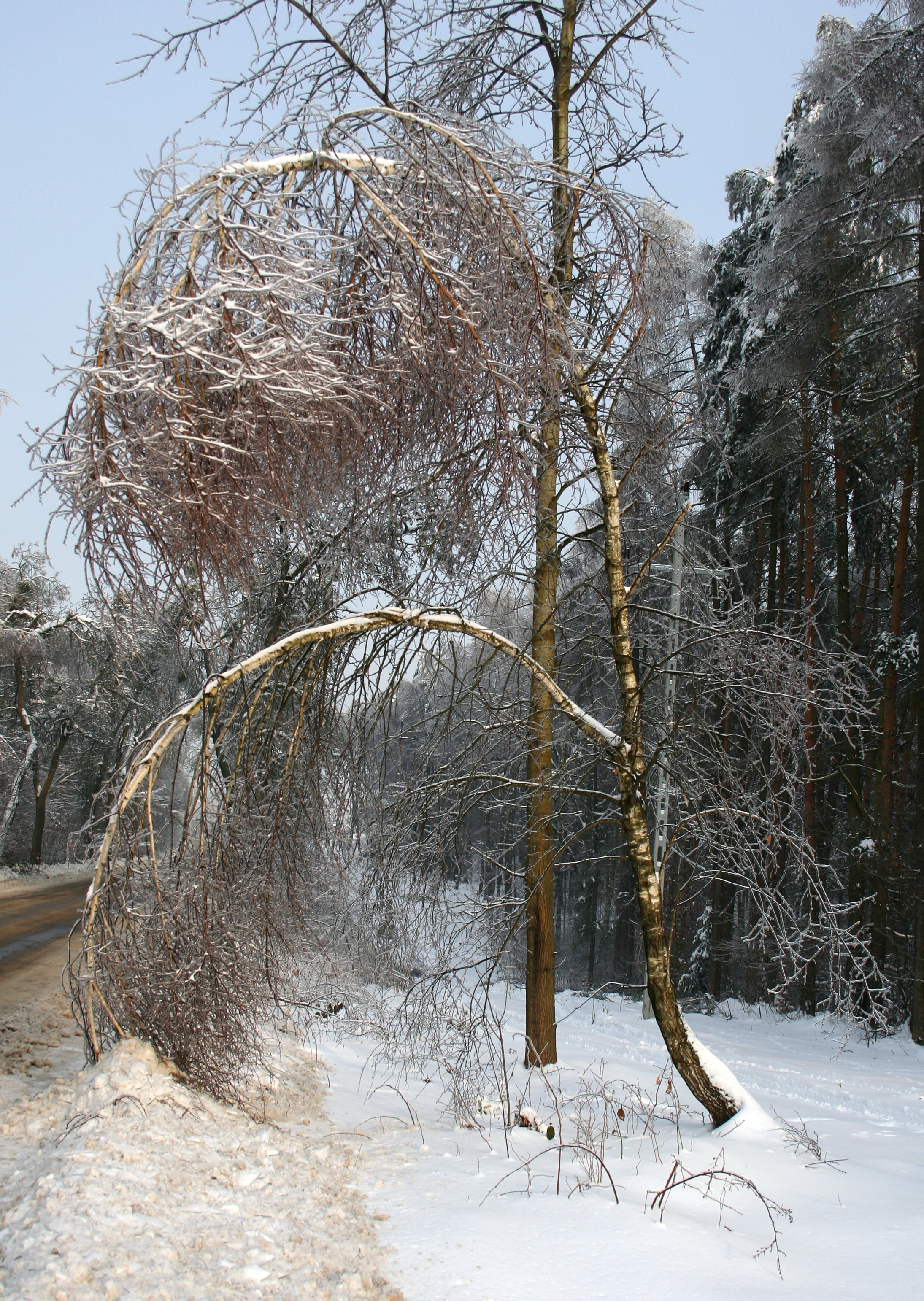 Oblodzenia na drzewach - skutek okiści, w wyniku czego pojawiały się śniegołomy wywołujące duże straty w leśnictwie - Nadleśnictwo Koszęcin